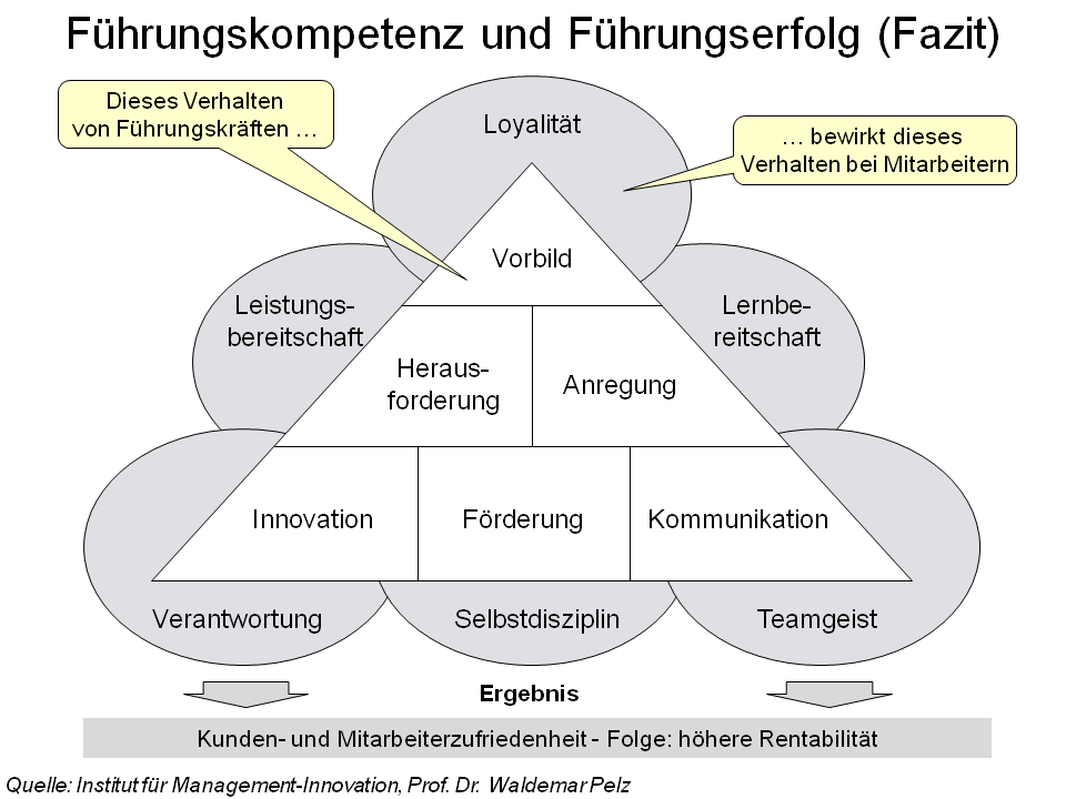 Abbildung 3: Führungskompetenz und Führungserfolg (Fazit)